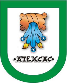 Atexcac: etimológicamente se forma por tres voces en náhuatl: atl que significa agua; texcalli, peña y co, en; que unidas quieren decir "En el agua de la peña".